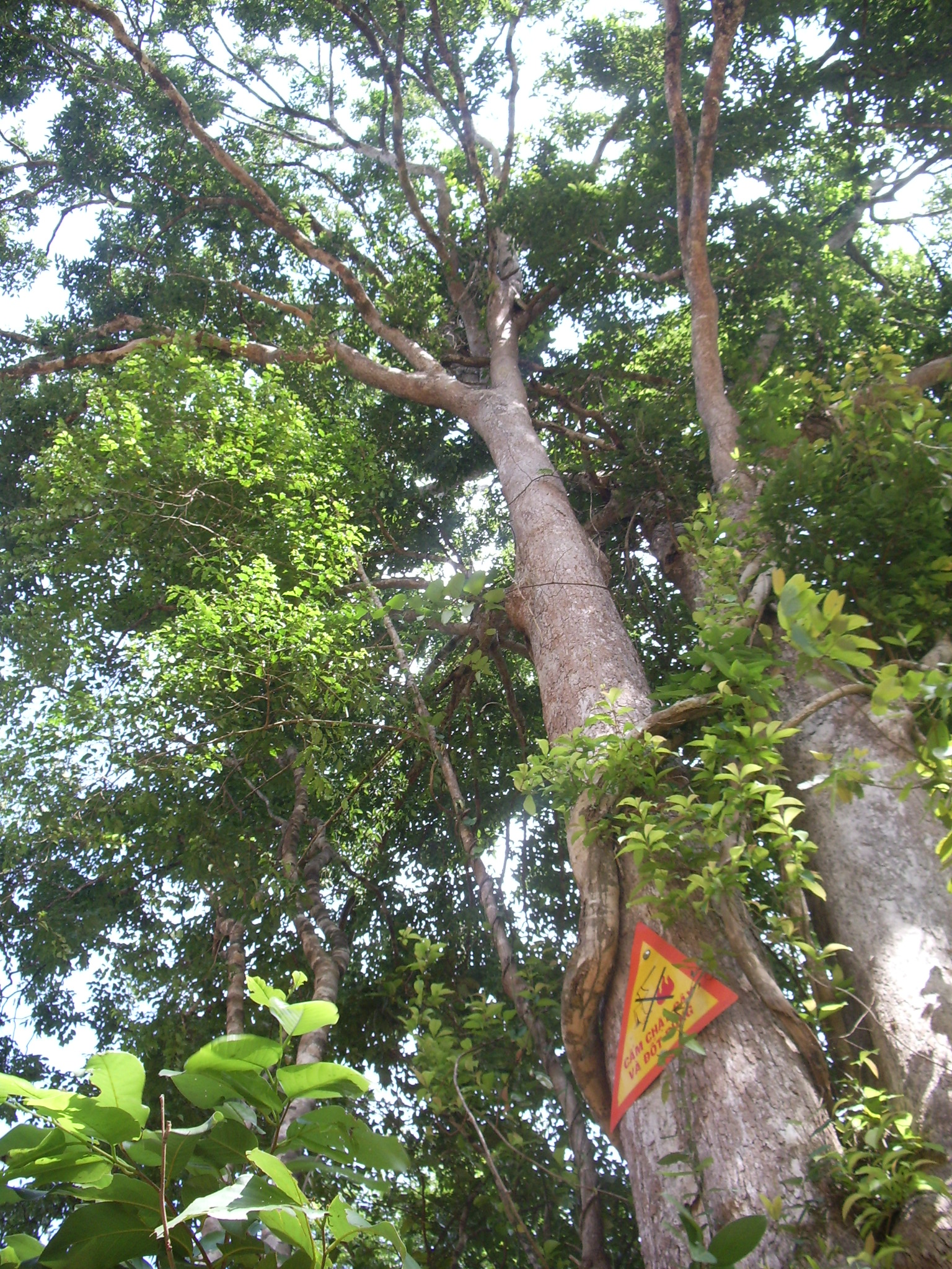 An ecosystem in Bình Châu- Phước Bửu protected nature area, Vietnam.